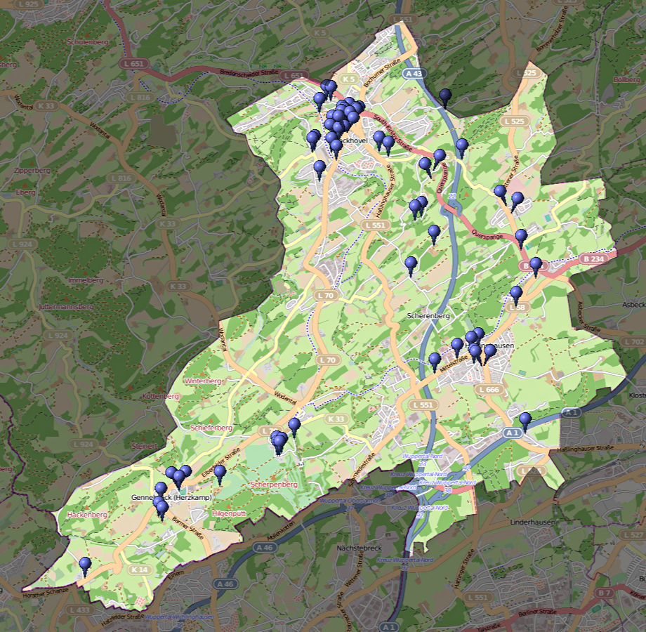 Karte der Lage aller Baudenkmäler in Sprockhövel, Stand Februar 2013